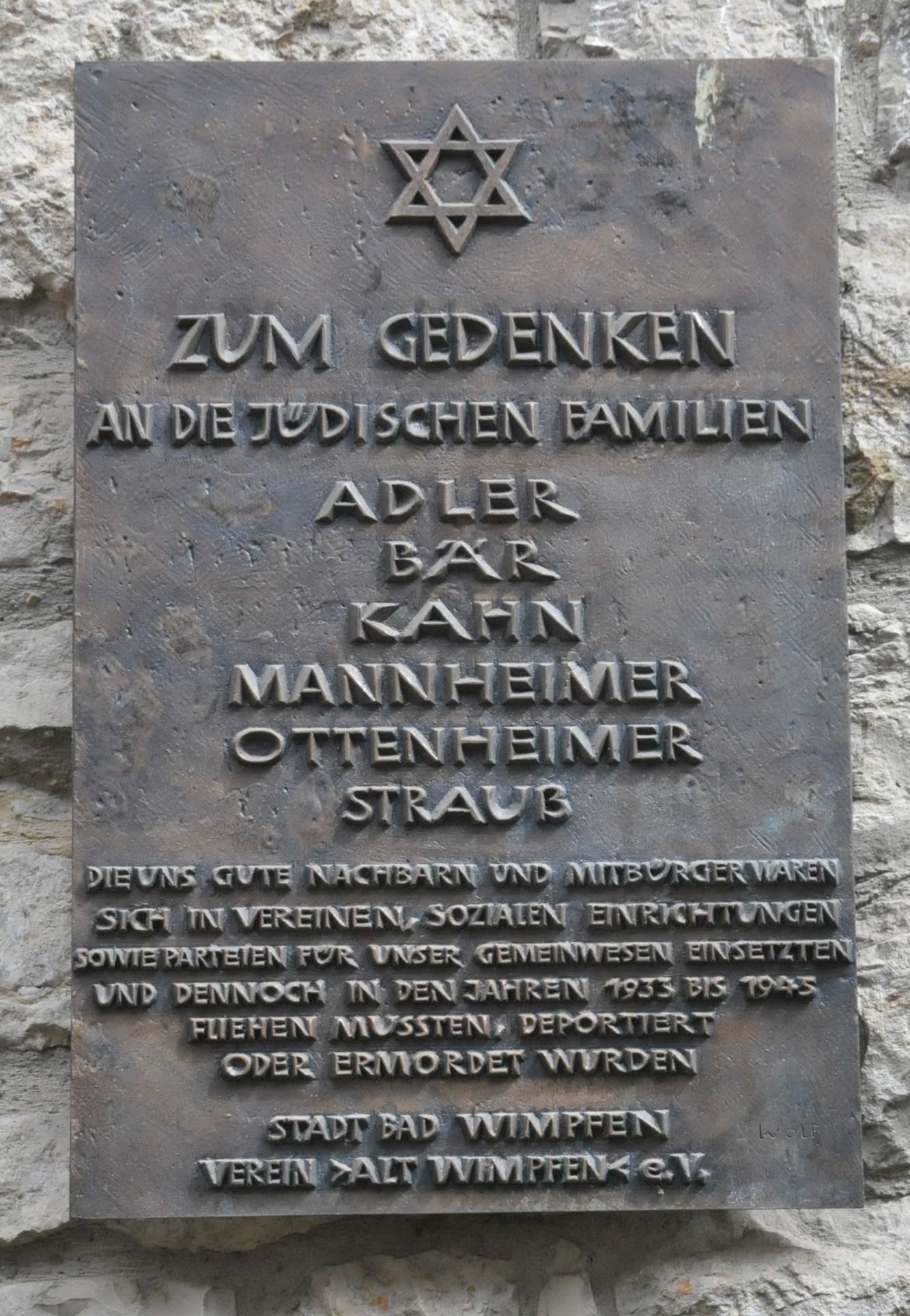 Gedenktafel in Bad Wimpfen wegen Judendeportation in NS-Zeiten